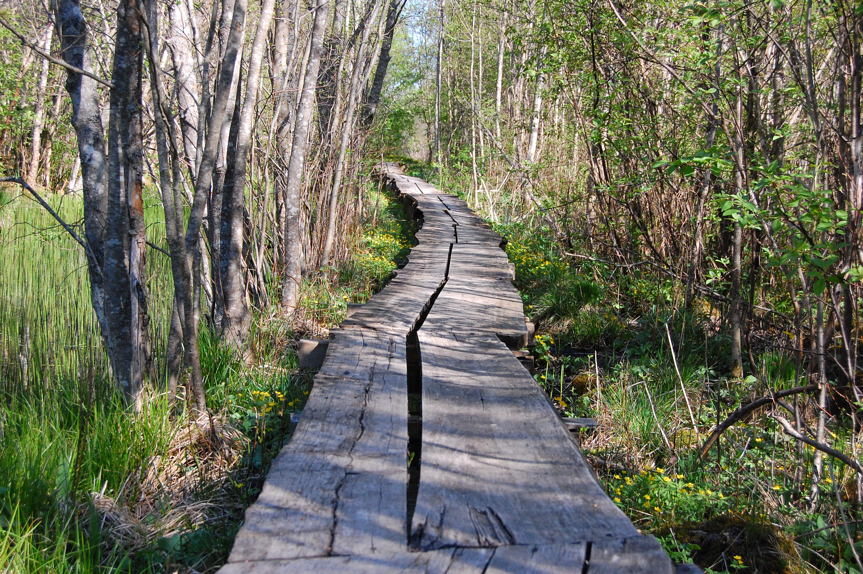 Penijõe matkarada